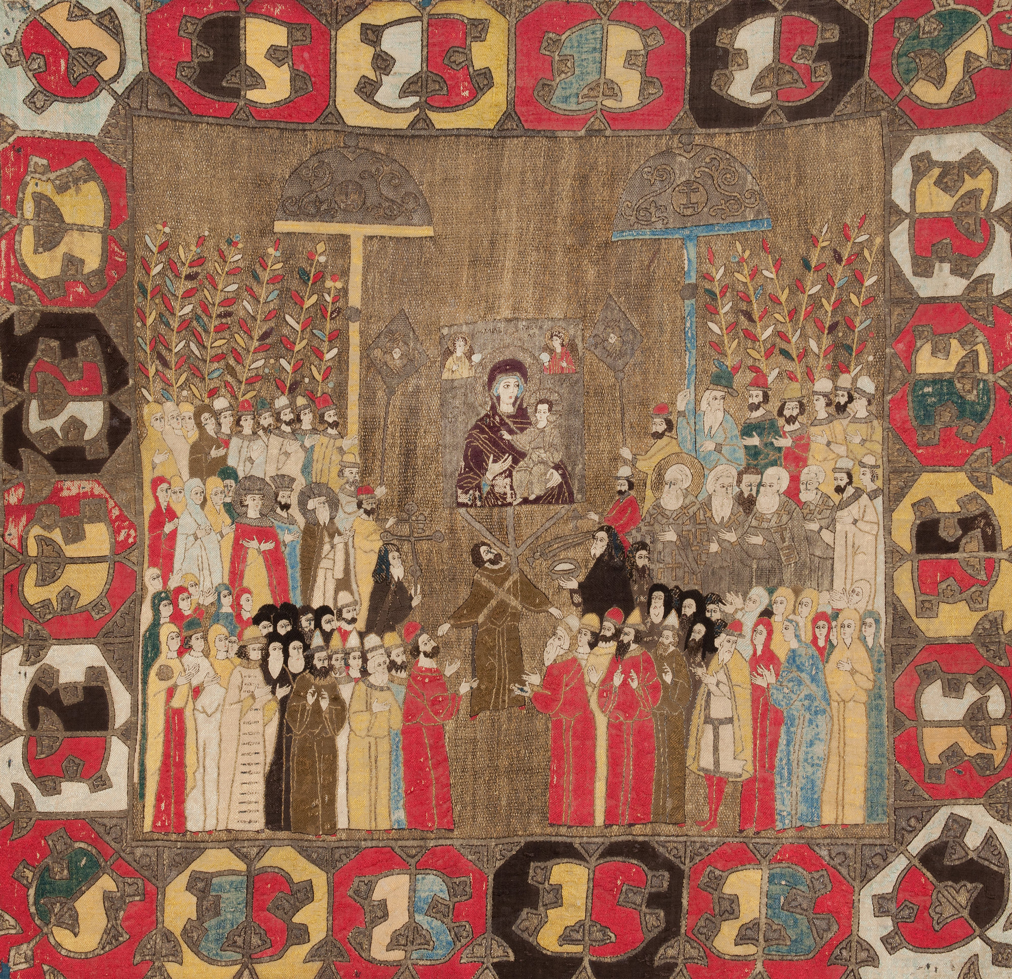 ПЕЛЕНА. ВЫНОС ИКОНЫ «БОГОМАТЕРЬ ОДИГИТРИЯ» Конец XV века Москва Мастерская Елены Стефановны Волошанки (?) Тафта, холст (крашенина), золотосеребряные пряденые нити, цветные шелковые нити; вышивка 95 х 98 (по большим сторонам) Поступила в 1905–1911 годах Находилась в коллекции М.М. Зайцевского, затем П.И. Щукина Реставрирована в 1925 году в ЦГРМ ГИМ инв. 15495щ РБ-5